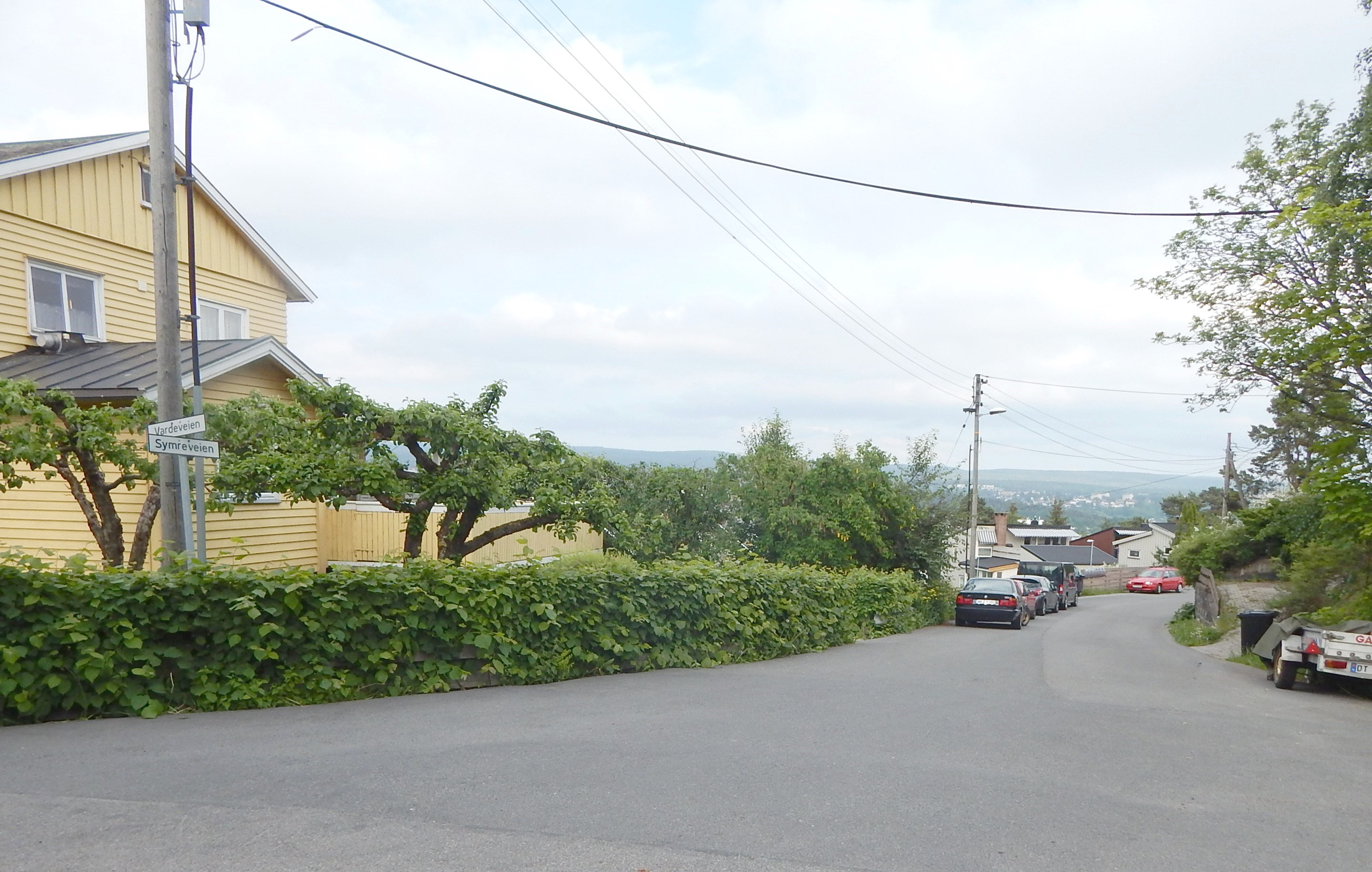 Symreveien sett fra Vardeveien